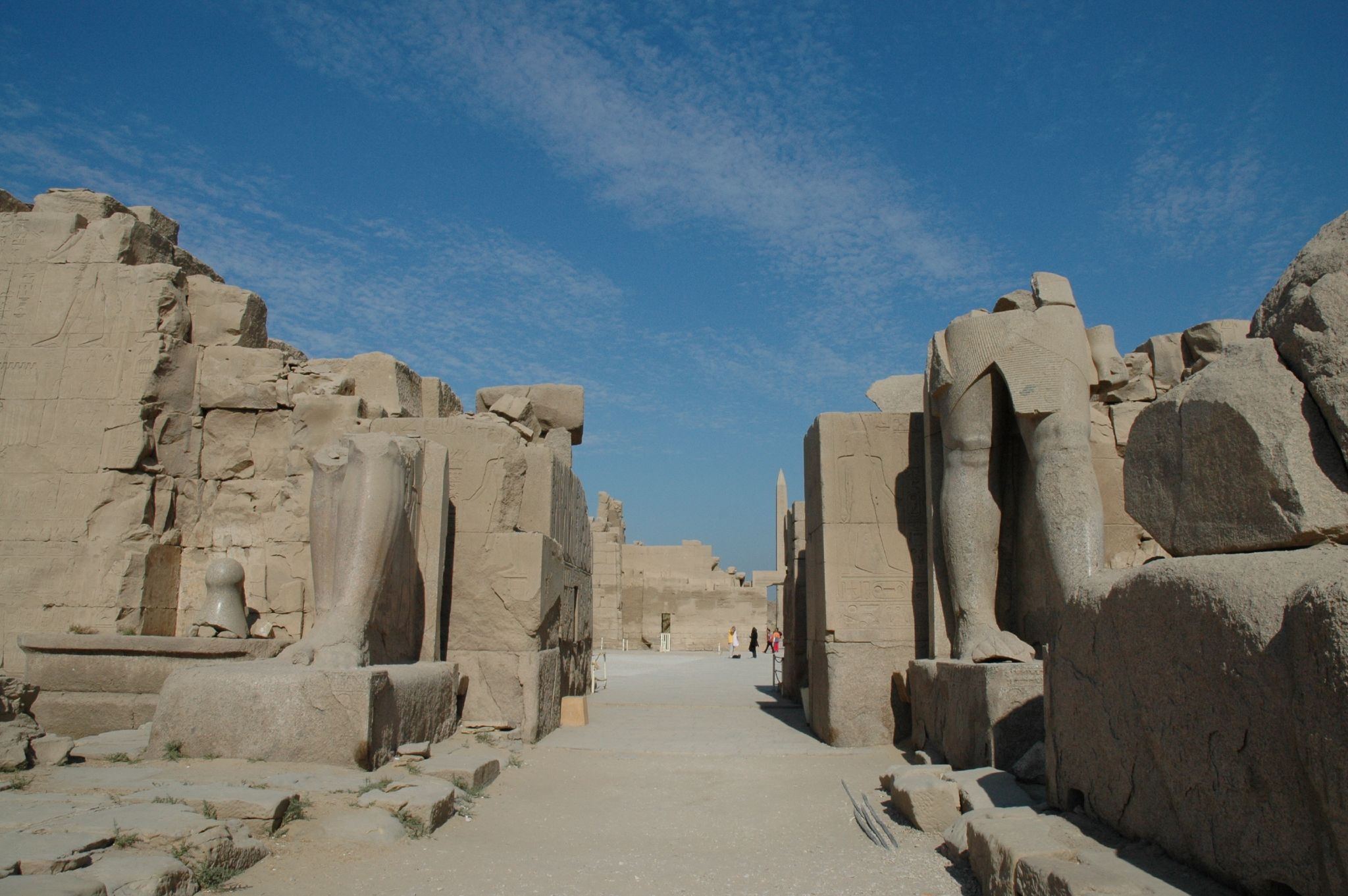 Tempio di Karnak: viale tra il tempio di Mut e quello di Amon